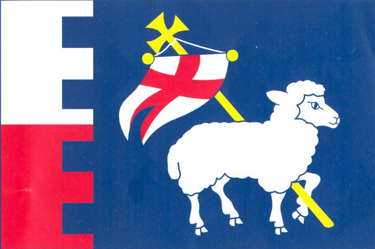 vlajka, Třebešov, okres Rychnov nad Kněžnou